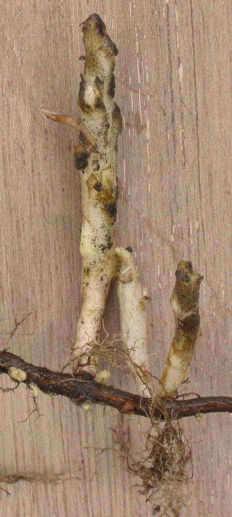 zelfgemaakte foto van wortelopslag bij wijnbes